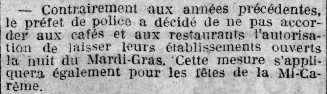 Cafés et restaurants parisiens non autorisés d'ouvrir les nuits du Mardi Gras et du Jeudi de la Mi-Carême.